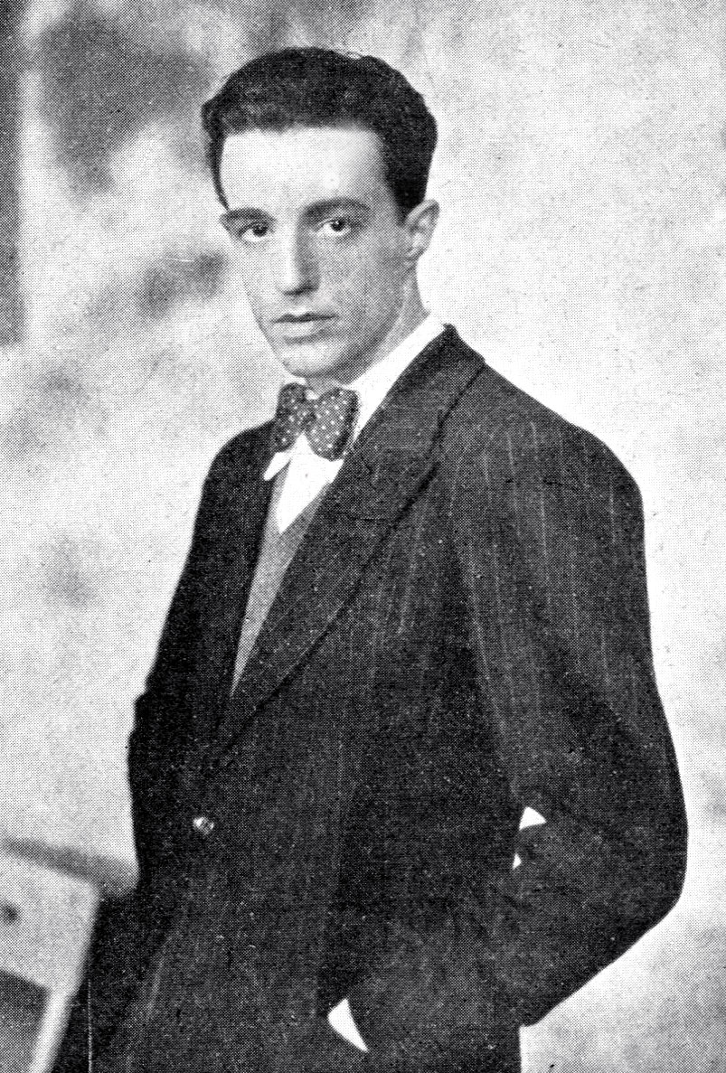 Vittorio De Sica in una immagine della fine degli anni venti